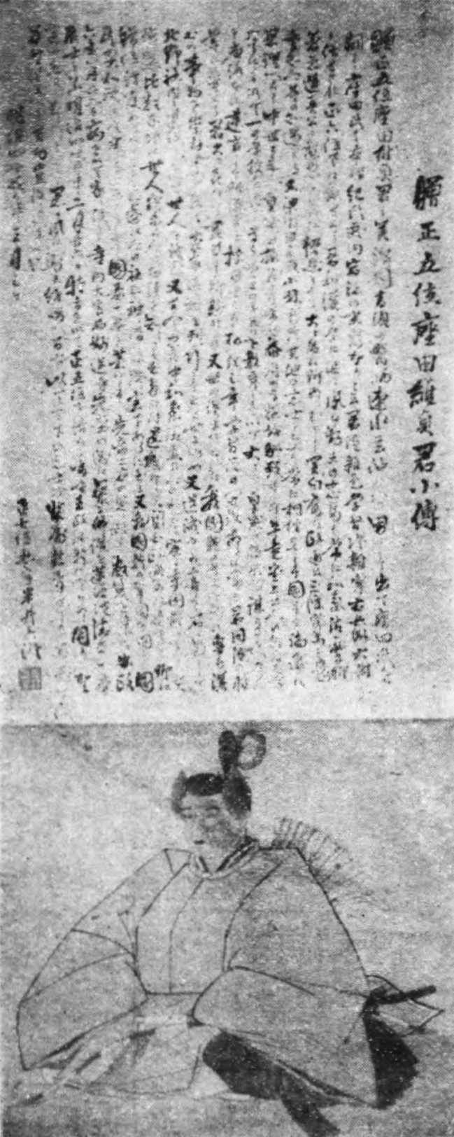 座田維貞自画像、贈正五位座田維貞君小伝